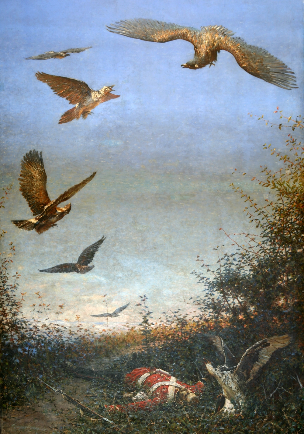 В. В. Верещагин. «Орлы» («Забытый солдат»). 1880-е. Холст, масло. 455 × 278 см. Николаевский областной художественный музей им. В.В. Верещагина, Николаев, Николаевская область, Украина.